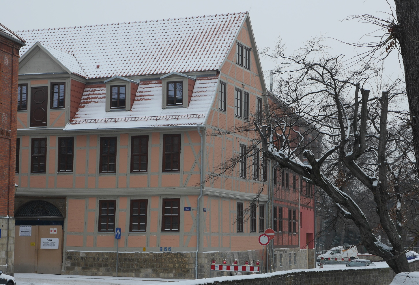 Klink 10 in Quedlinburg im Jahr 2015 während der Sanierung